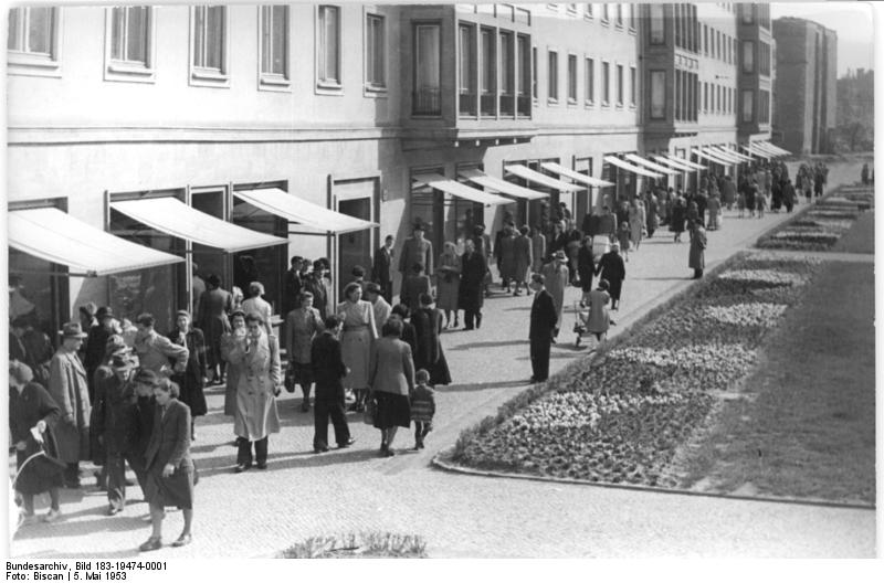 Zentralbild-Biscan Me-Wi. 5.5.1953 Der Sonntagsverkauf in Magdeburg Die Werktätigen machen von der Möglichkeit, bei der HO auch am Sonntag einkaufen zu können, regen Gebrauch. UBz, Die HO-Ladenstrasse in Magdeburg am Sonntag.